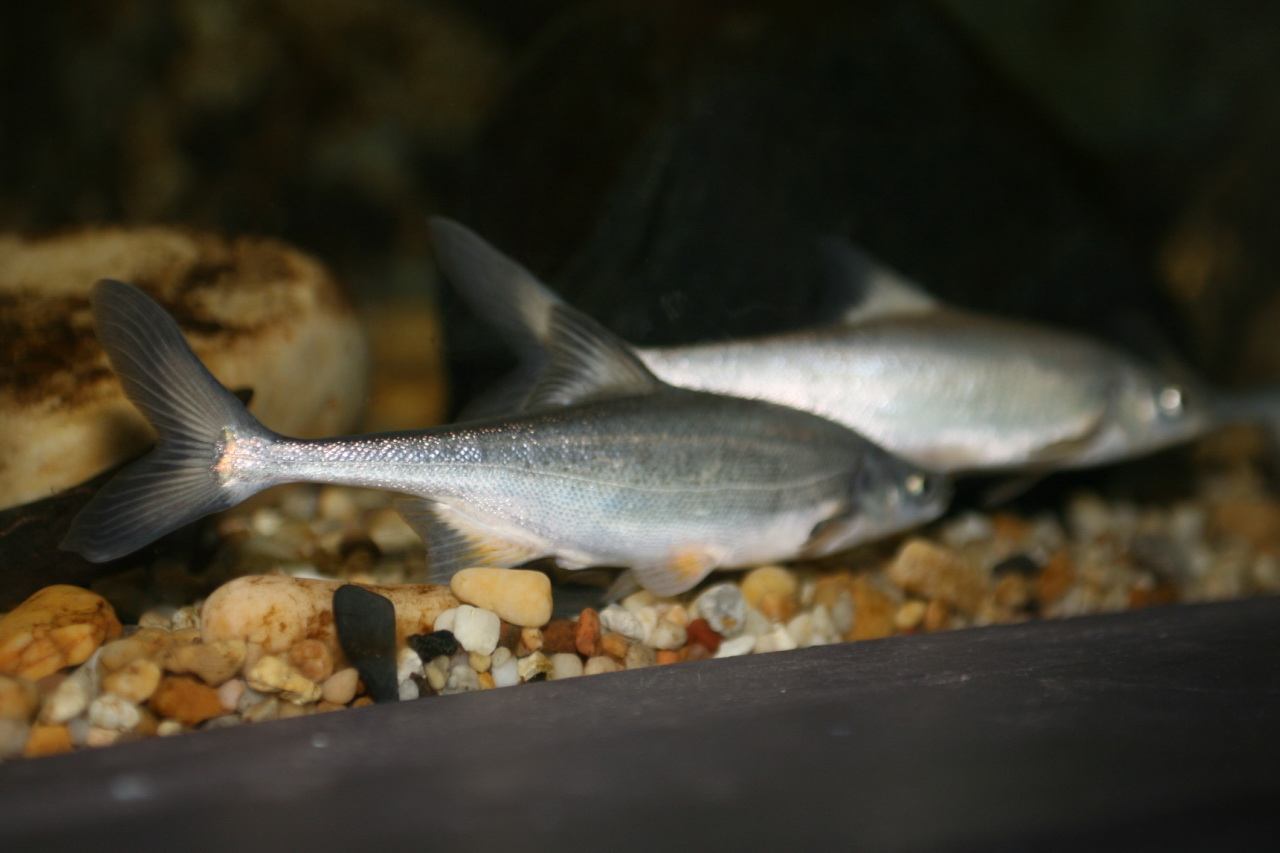 Boneytail (Gila elegans)